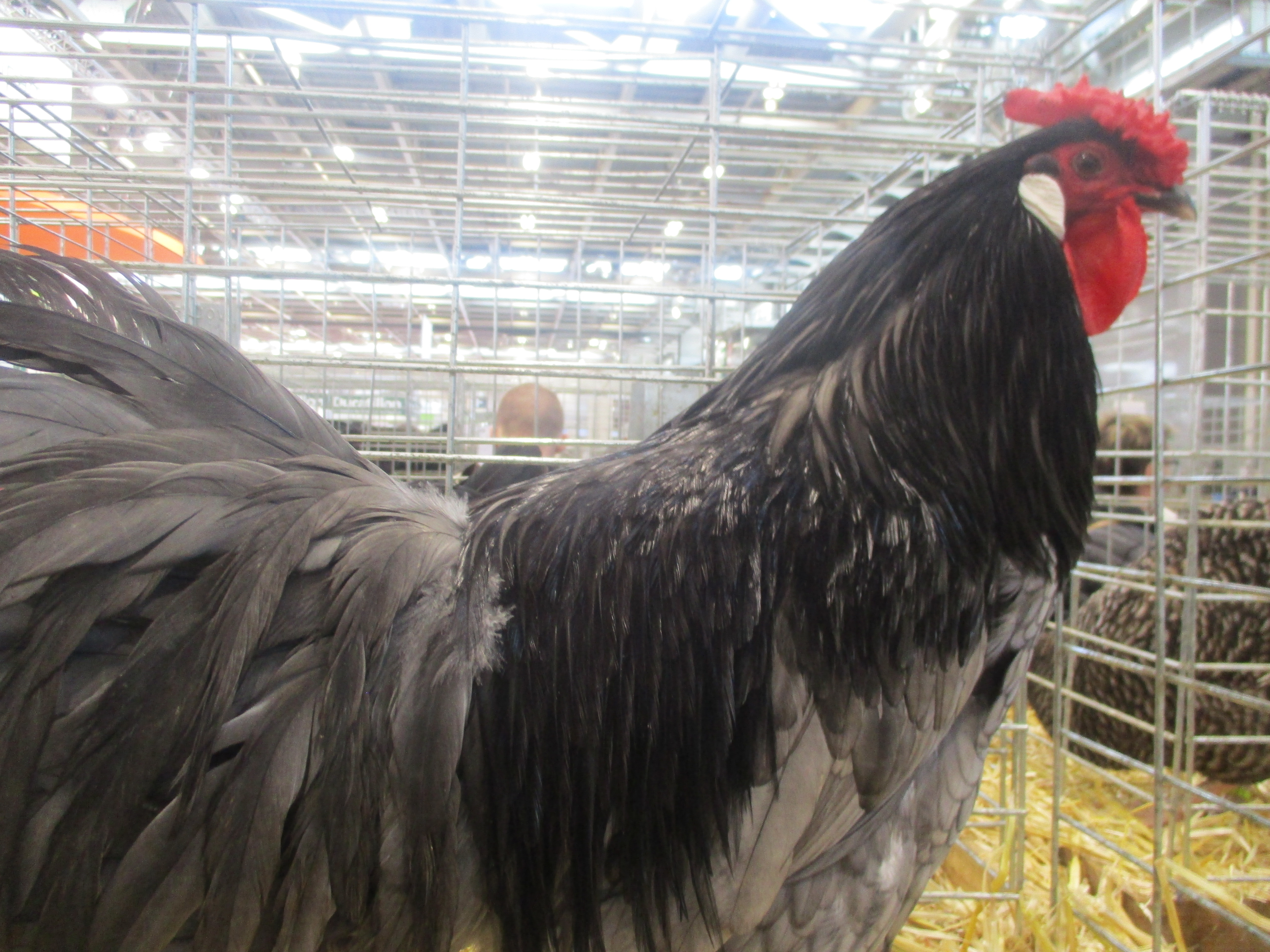 Coq d'Alsace bleu.